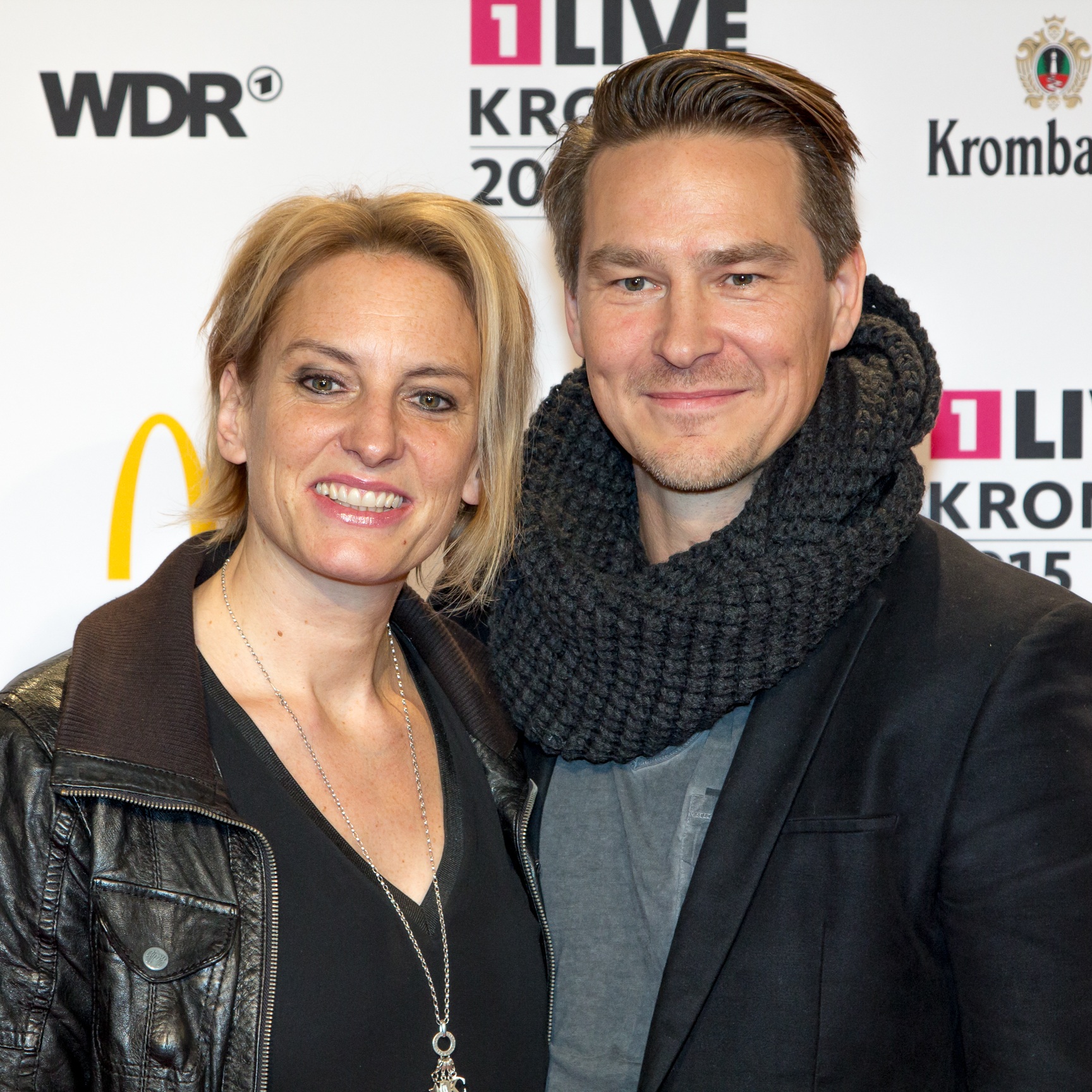 1LIVE Krone 2015 - Okka Gundel (l) mit Begleitung